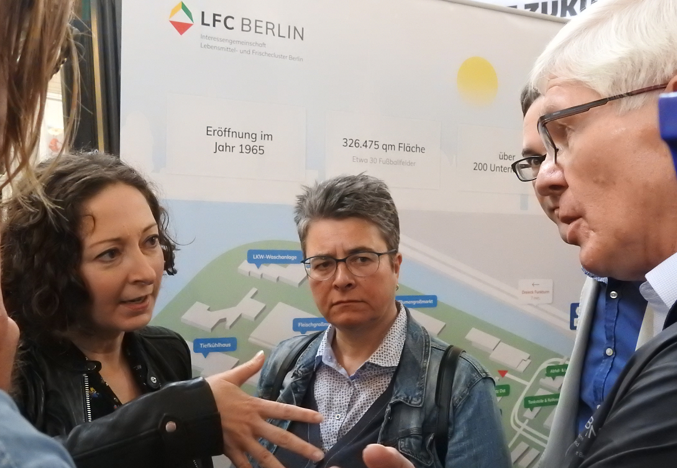 Wirtschaftssenatorin Ramona Pop (links) im Gespräch mit Bezirksbürgemeisterin Monika Herrmann und Dieter Krauß